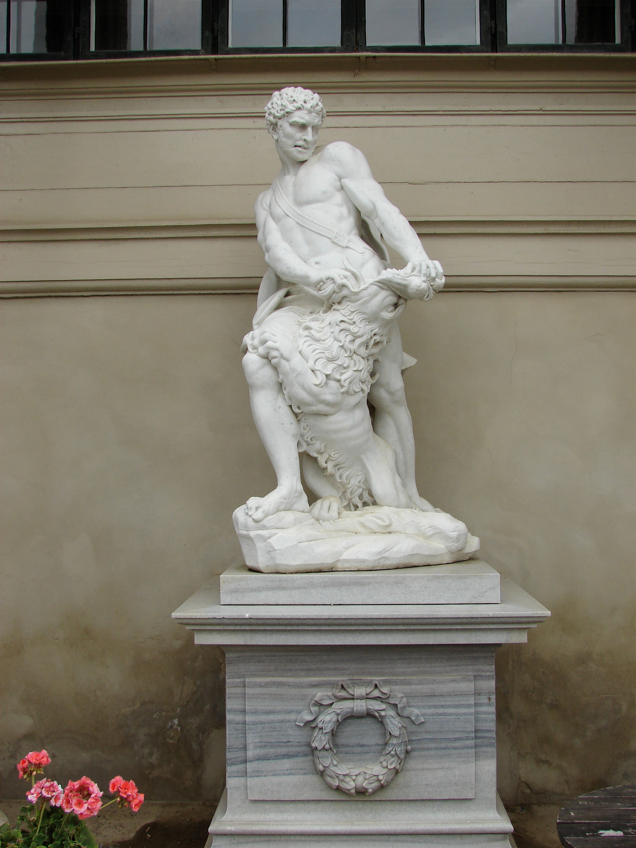 Herkules dræber løven (genhugget i 2006), Giovanni Baratta, indkøbt af Frederik IV 1708-09 under sin Italiensrejse, Herkulespavillionen, Kongens Have, København